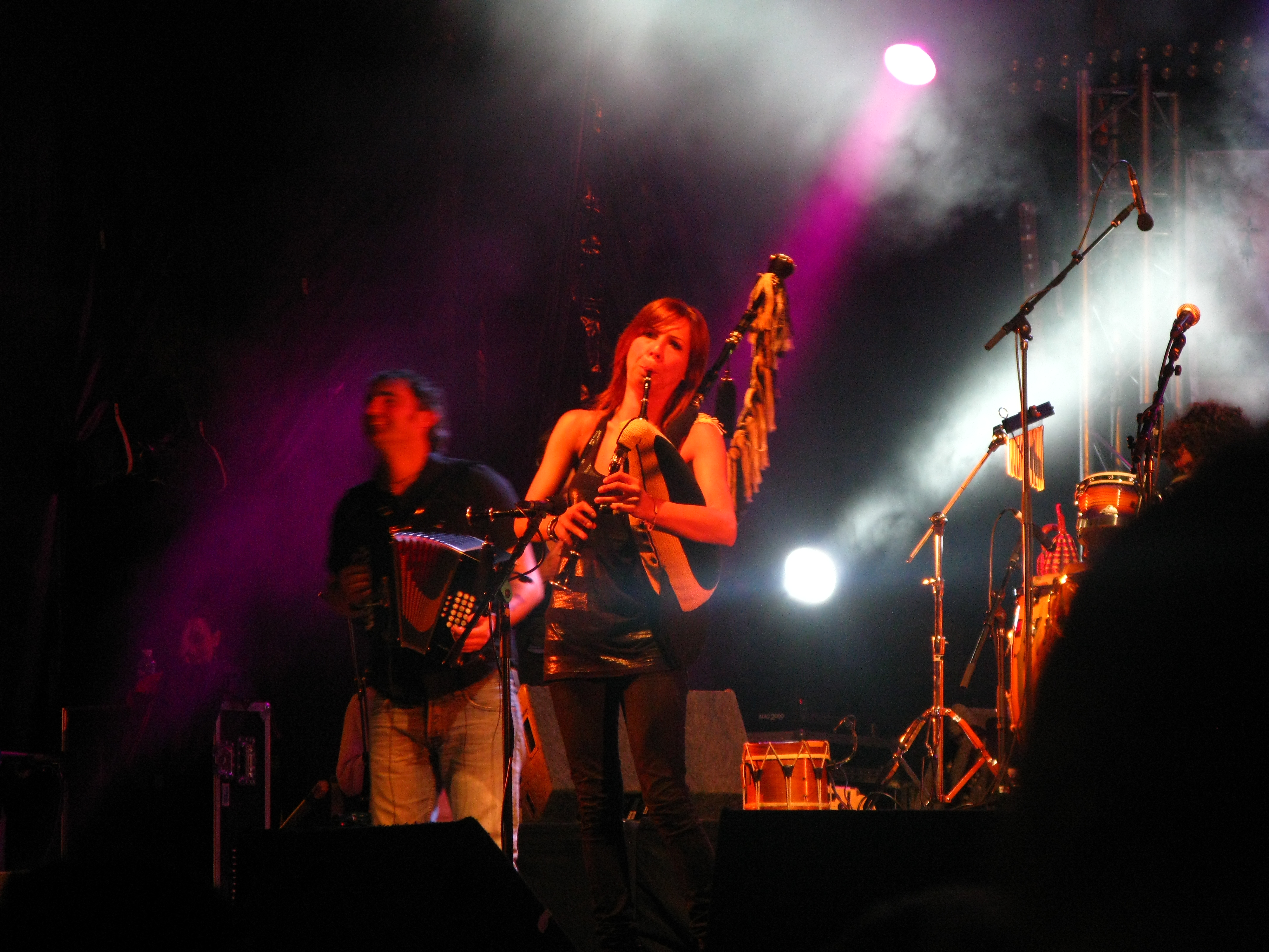 Susana Seivane pendant le festival interceltique de Lorient 2009